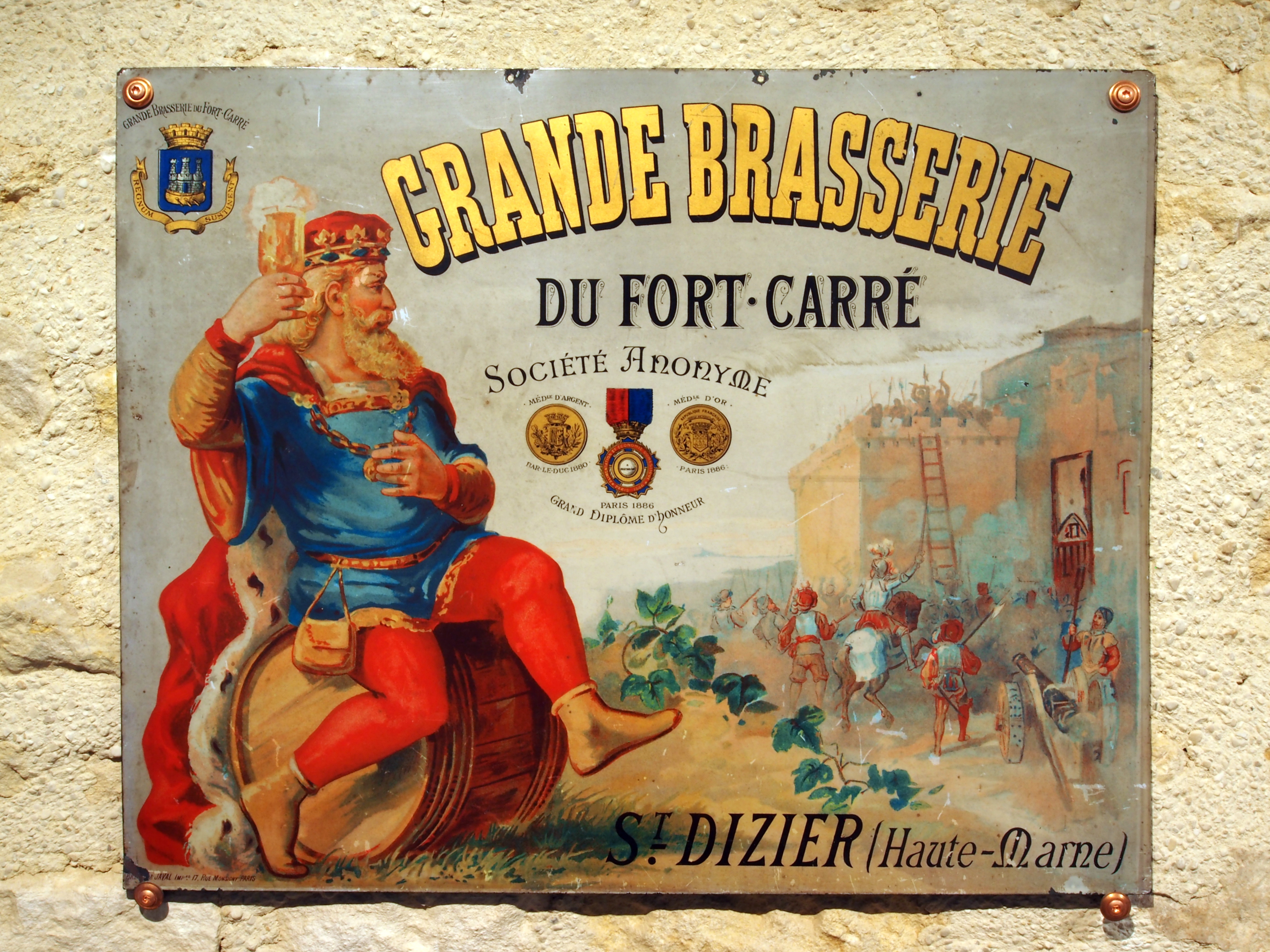 Grande Brasserie du Fort-Carré, St Dizier, enamel sign.